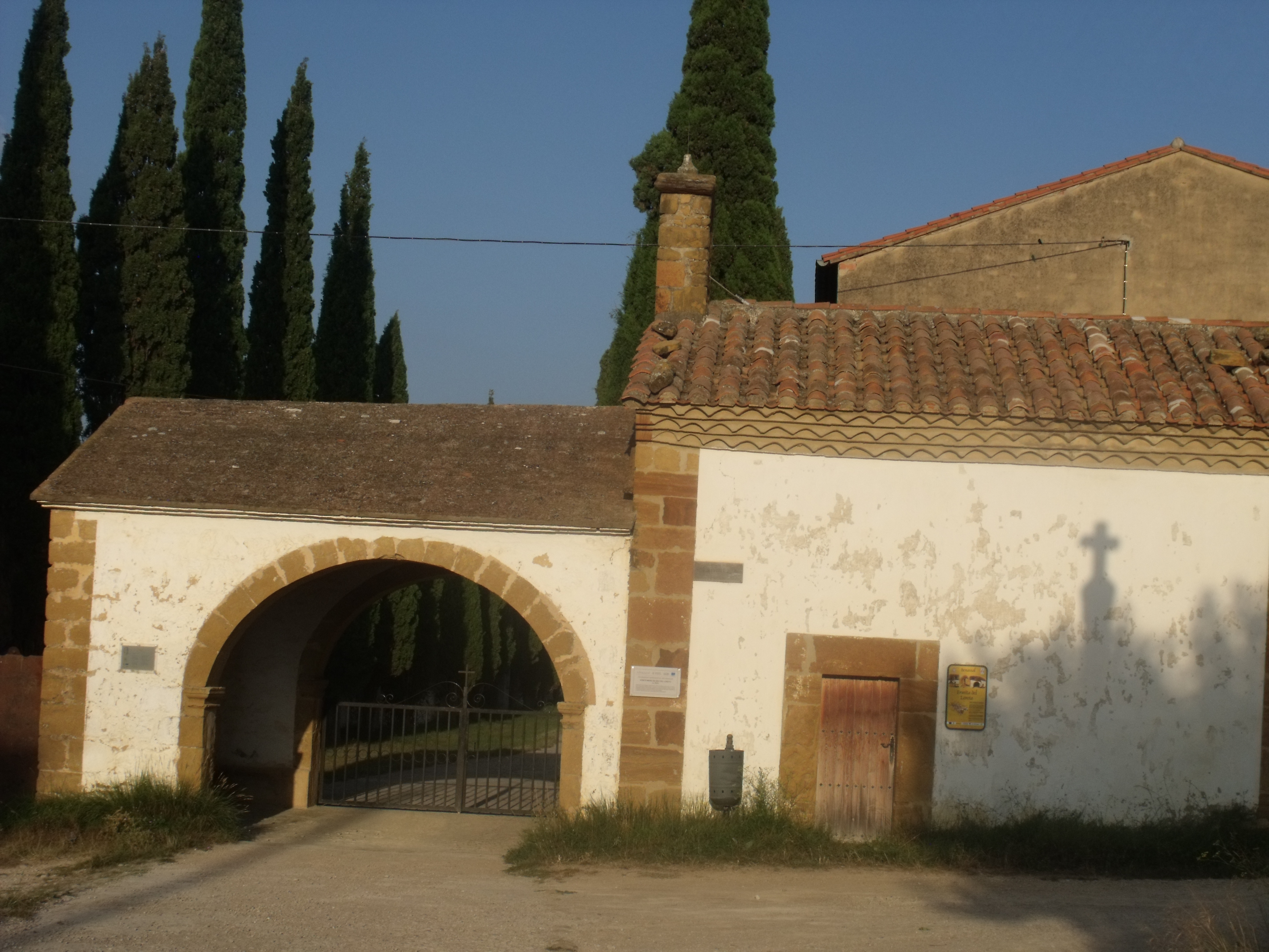 Ermita de Loreto. Benassal.